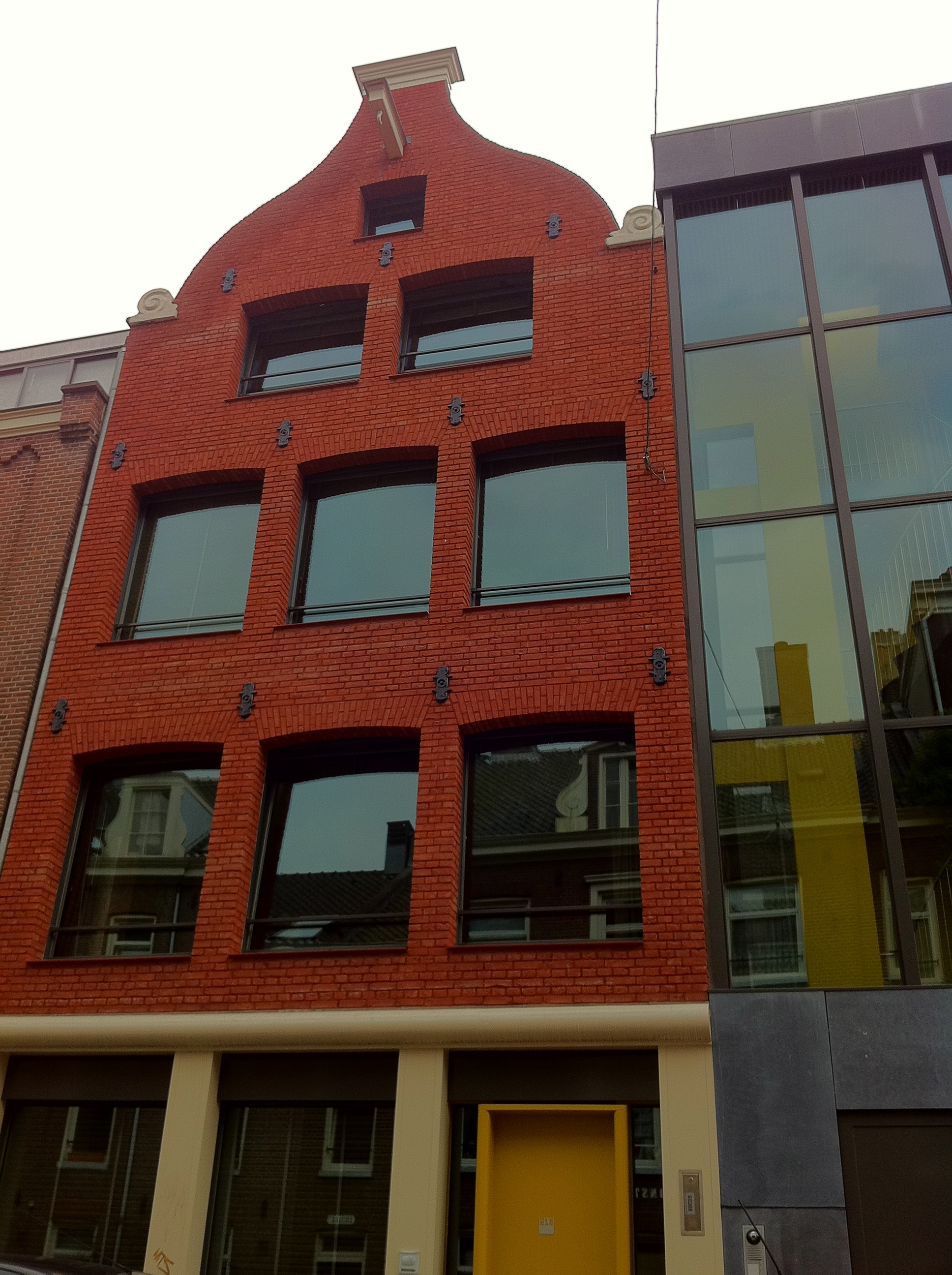 Joost Swarte Huis Willemsstraat 204-210 Amsterdam, verhuurd door Ymere